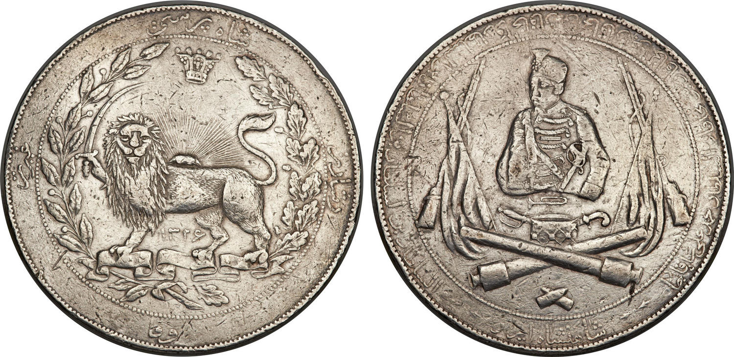 نشان نقره توپخانه محمدعلی شاه